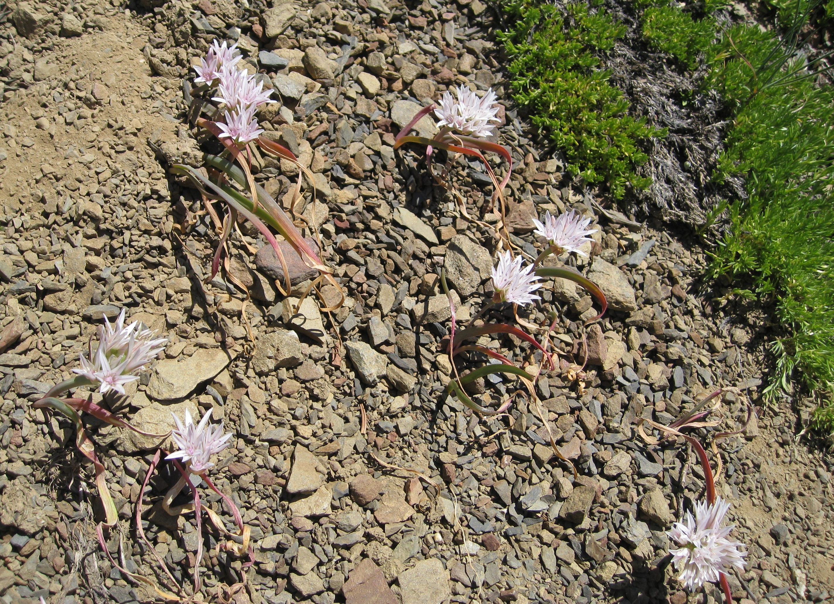 Allium crenulatum i100716 008